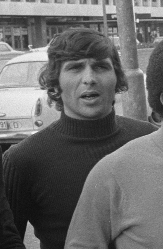 Jaime Graça en 1972